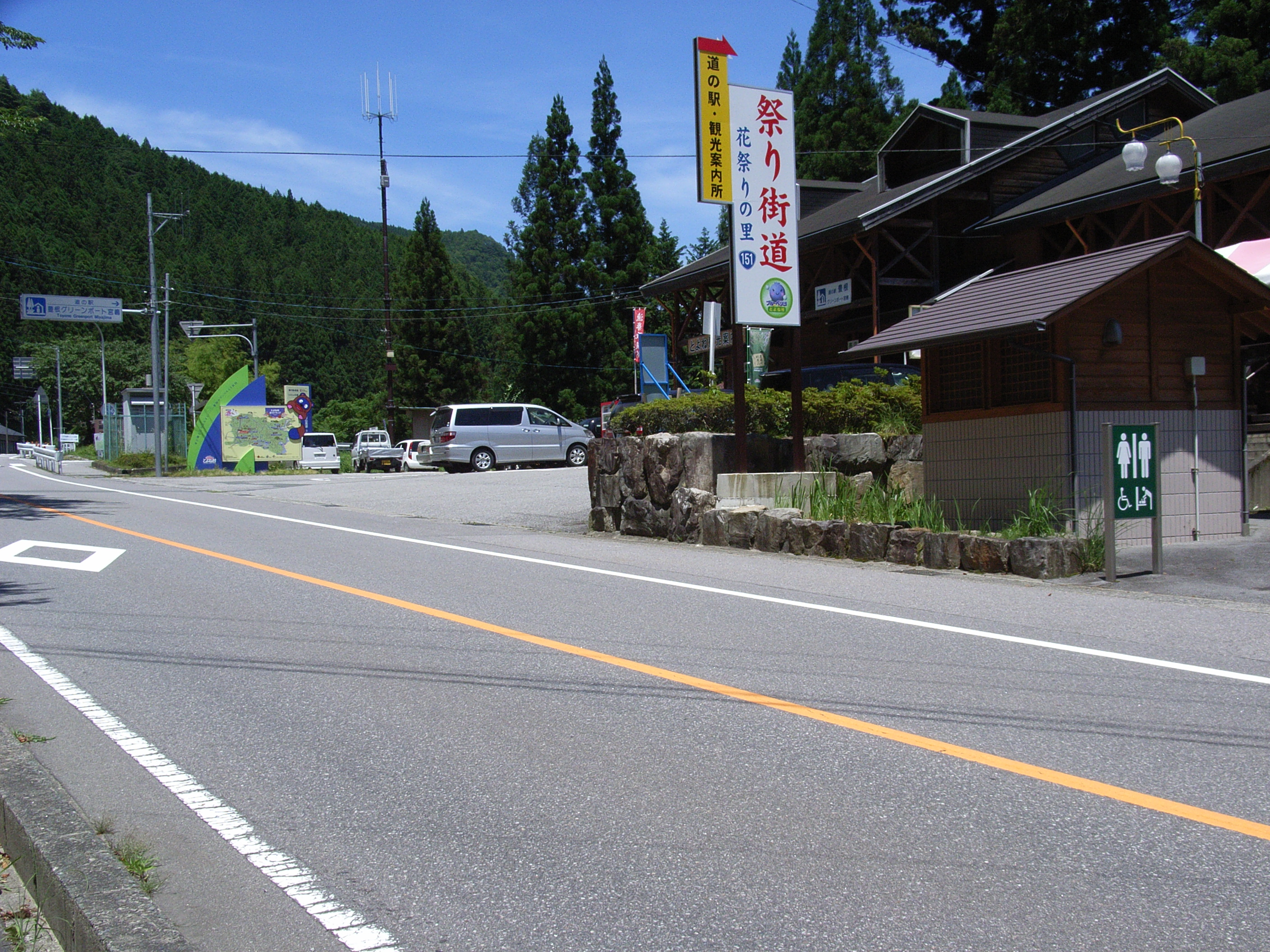 国道151号線道の駅豊根グリーンポート宮嶋。東栄町側から撮影。愛知県北設楽郡豊根村。